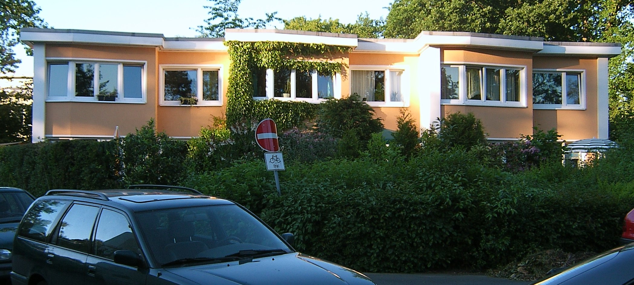 Hohnerkampsiedlung in Bramfeld